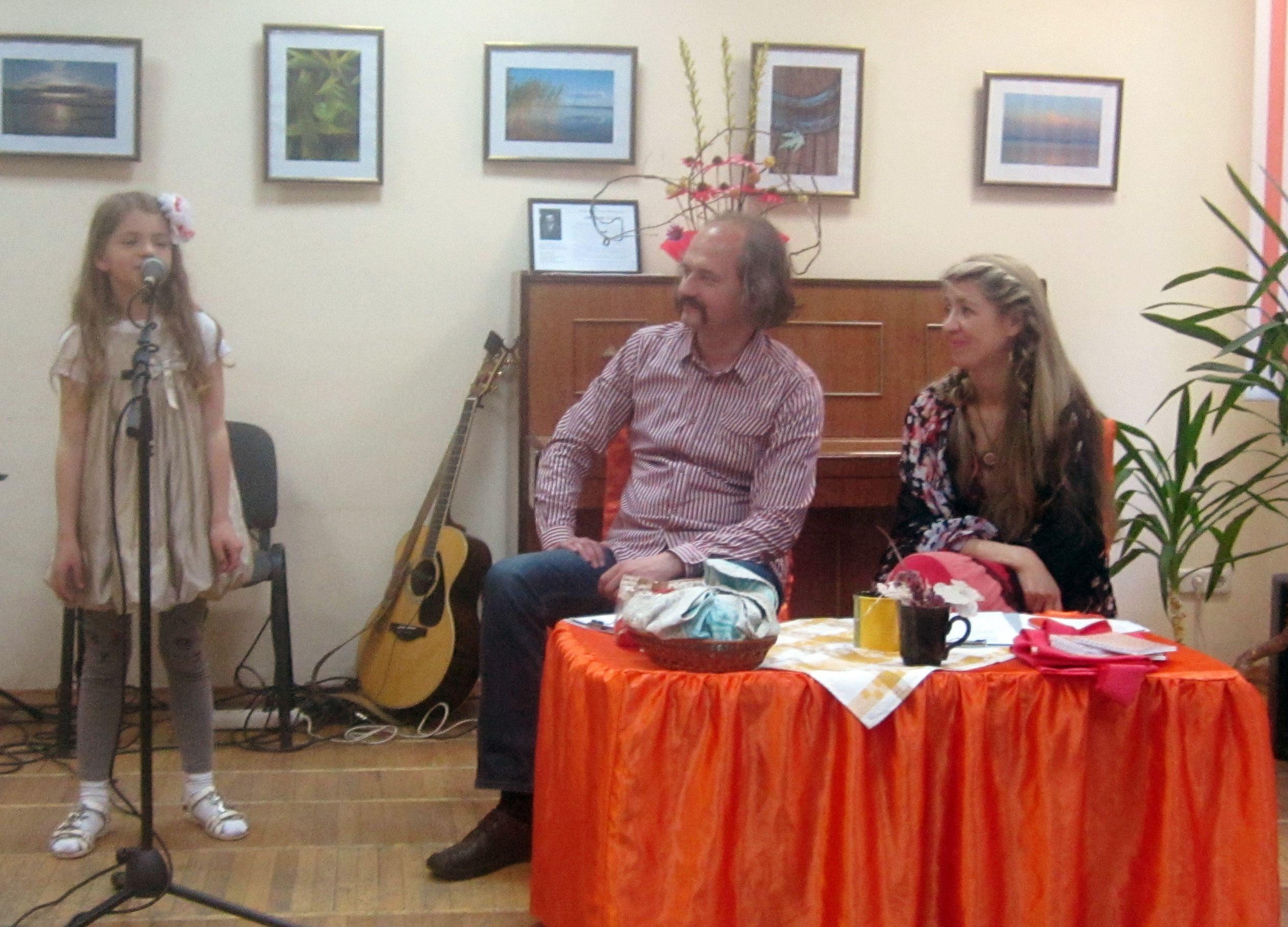 Сям'я Спрынчан-Малішэўскіх